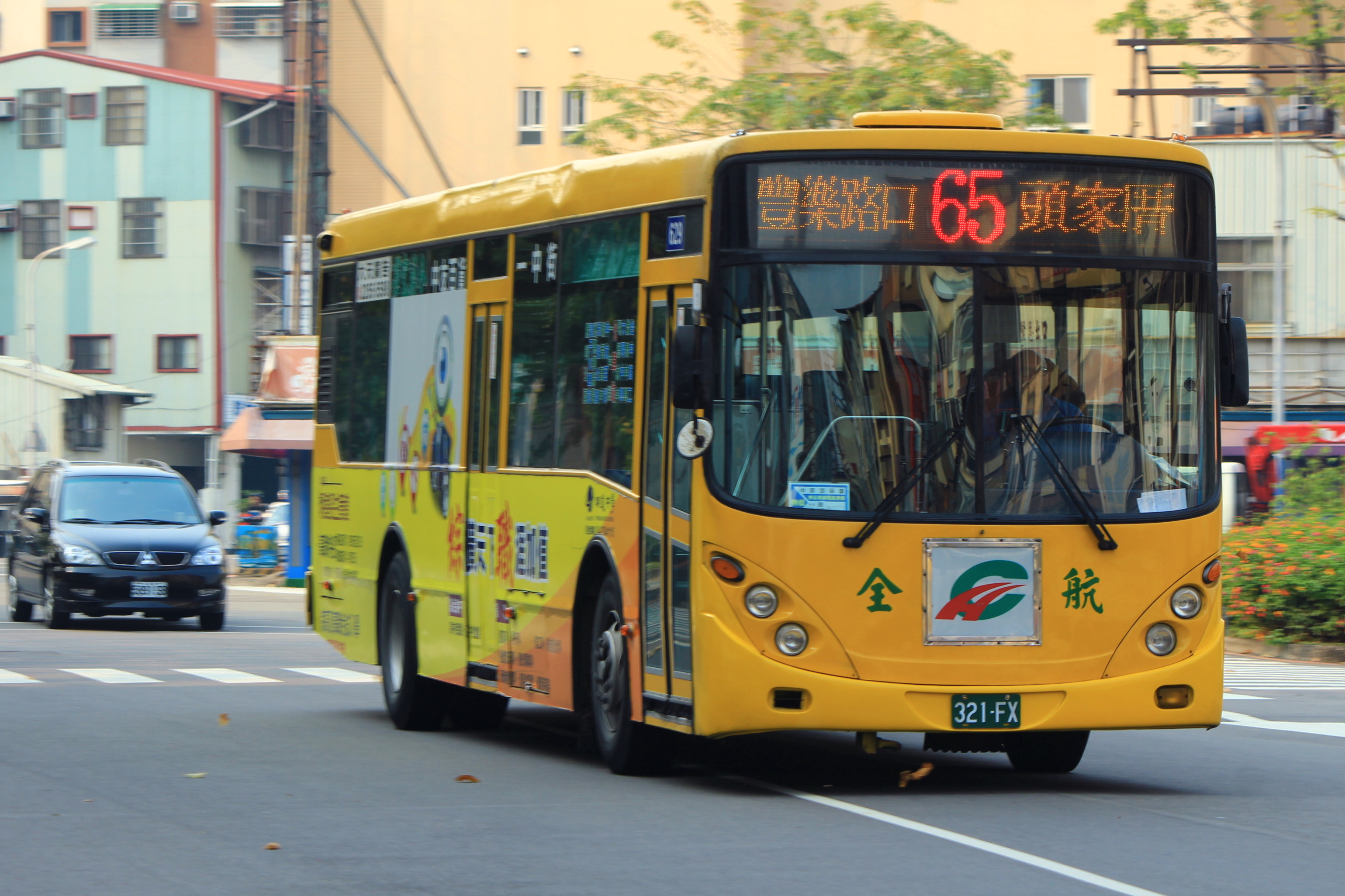 2004(2011)HINO ERK2JML(日盈)